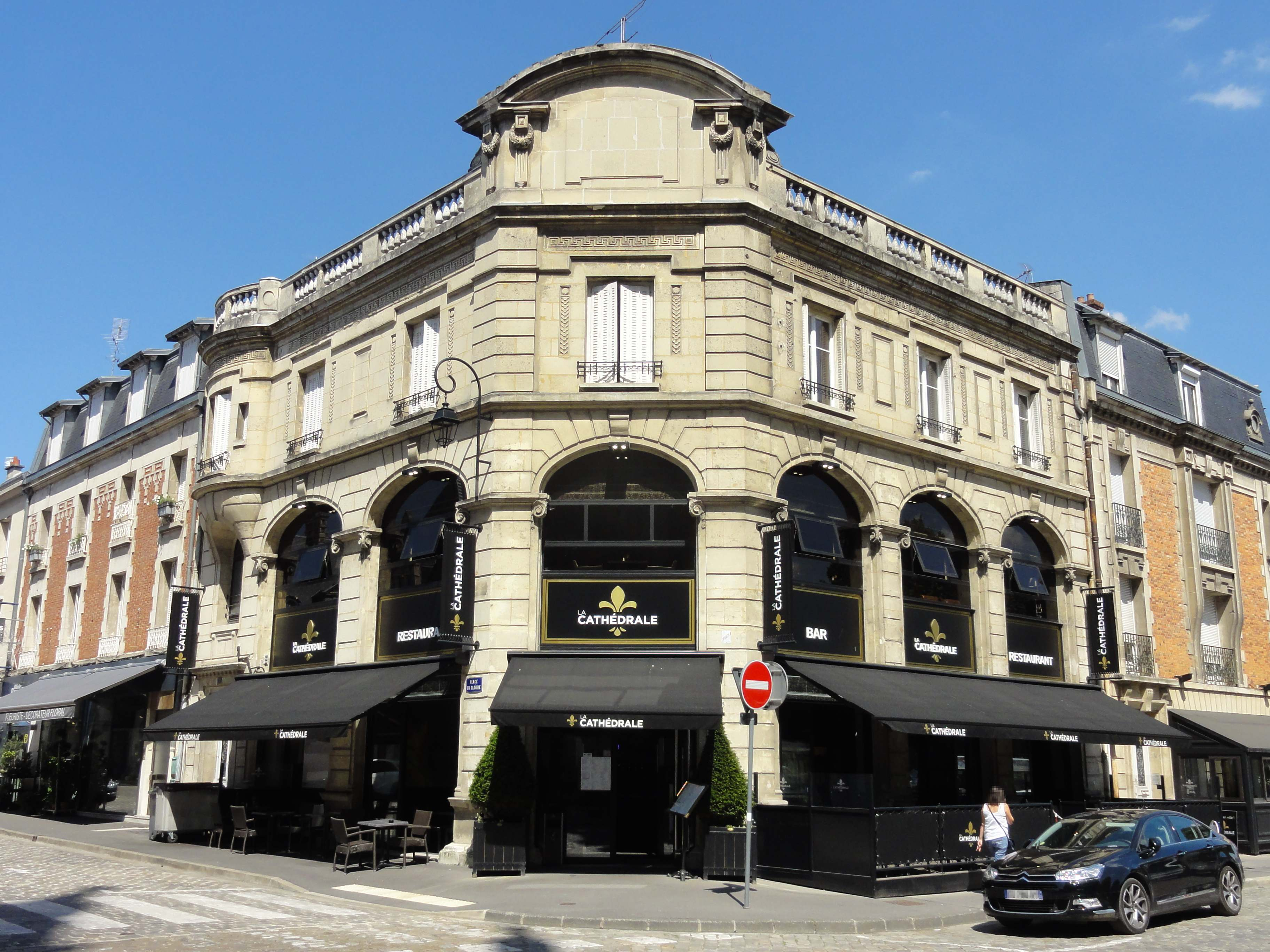 Brasserie La Cathédrale, place du Cloître / place Saints-Gervais et Protais.